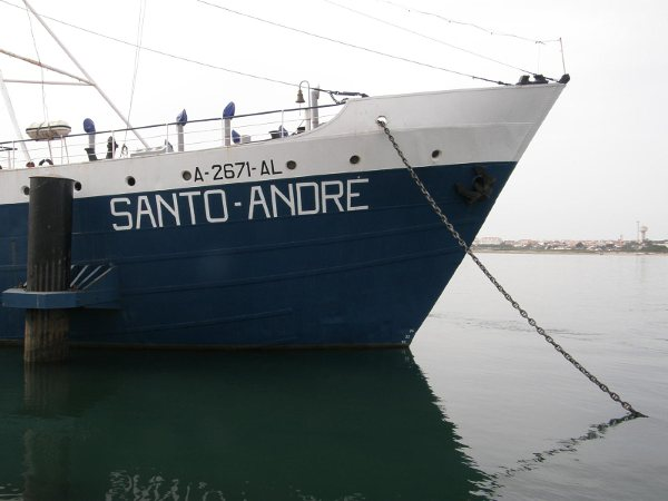 Navio Museu Santo André atracado no Jardim Oudinot, Gafanha da Nazaré